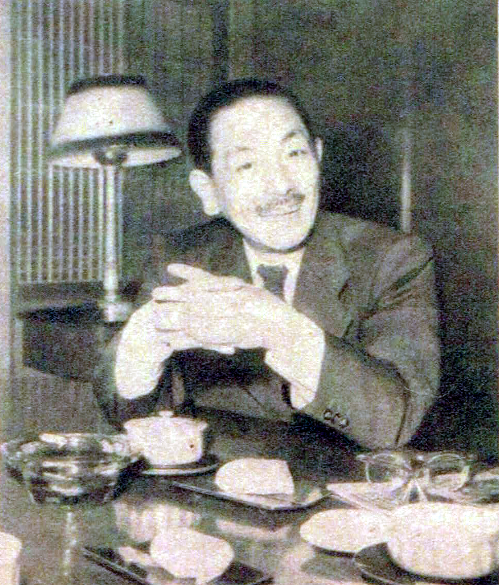 世界映画社『日本映画』第2号（1953）より木村荘十二